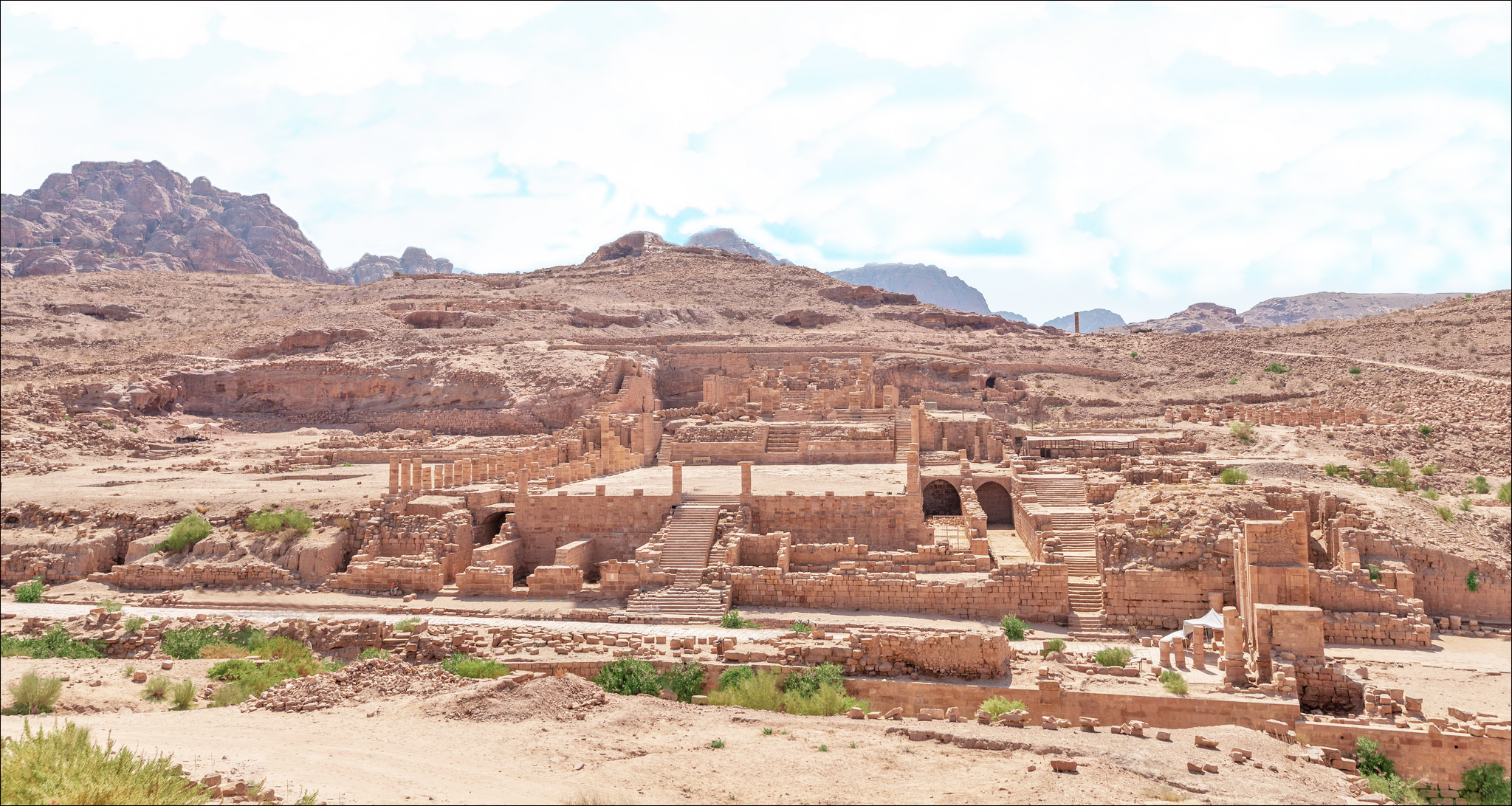 Le Grand Temple vue de son entrée coté est.